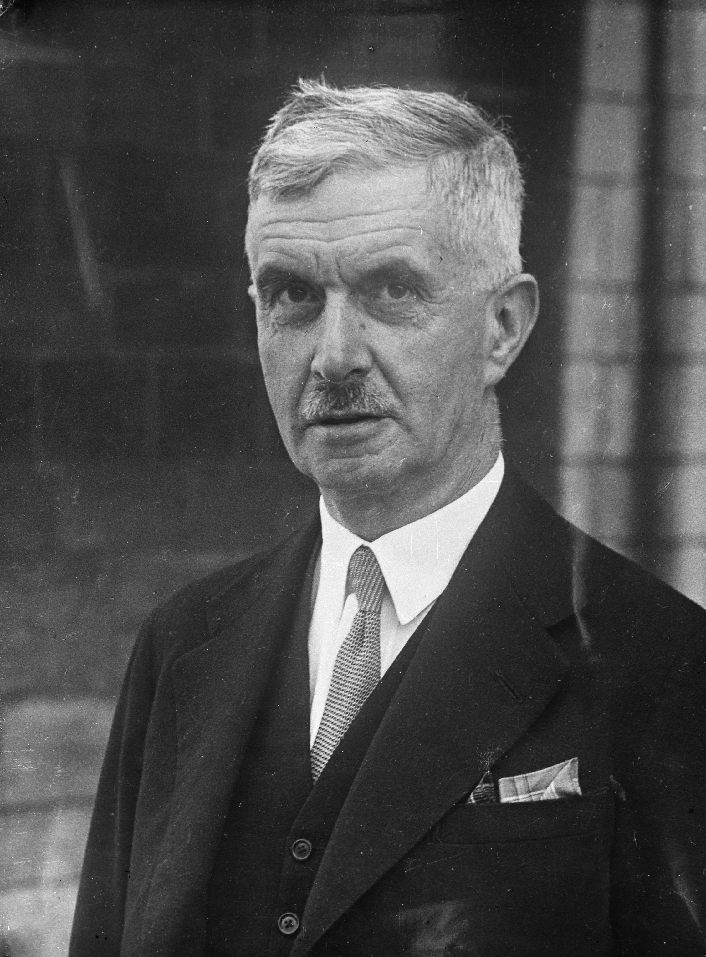 Collectie / Archief : Fotocollectie Anefo Reportage / Serie : Bewindslieden Brits Kabinet 1945 Beschrijving : James Chuter Ede (minister van Binnenlandse Zaken (Home Secretary)). Annotatie : Repronegatief Datum : augustus 1945 Locatie : Groot-Brittannië Trefwoorden : ministers, portretten Fotograaf : Fotograaf Onbekend / Anefo Auteursrechthebbende : Nationaal Archief Materiaalsoort : Glasnegatief Nummer archiefinventaris : bekijk toegang 2.24.01.09 Bestanddeelnummer : 900-7223